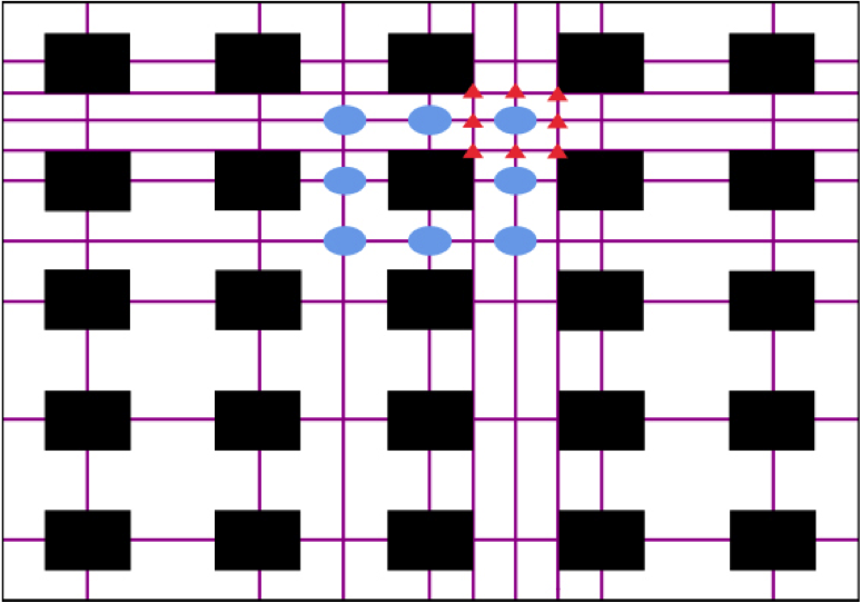 Posiciones de búsqueda de las distintas unidades de píxel